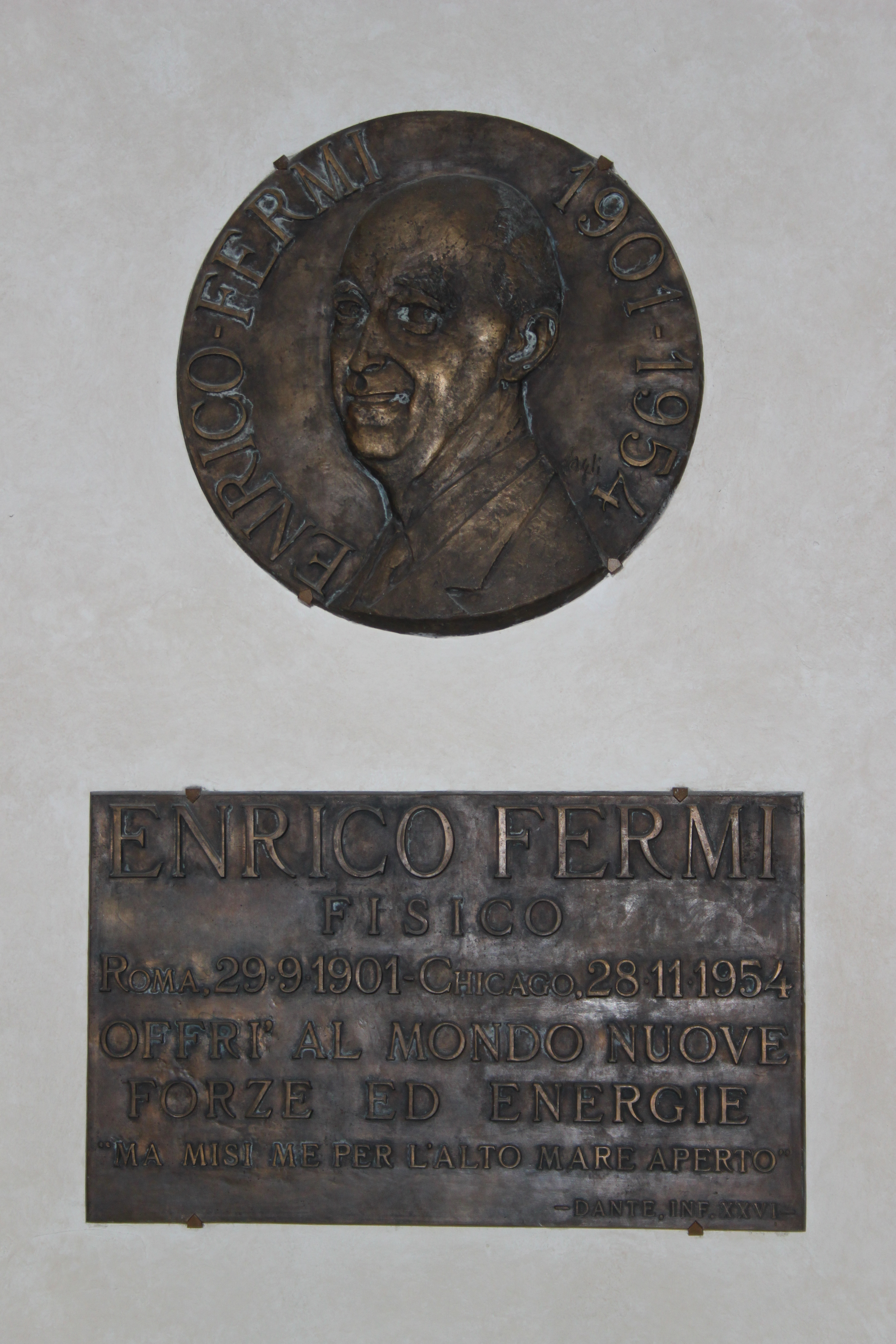 Das Grab Enrico Fermis in der Kirche "Santa Croce" in Florenz.